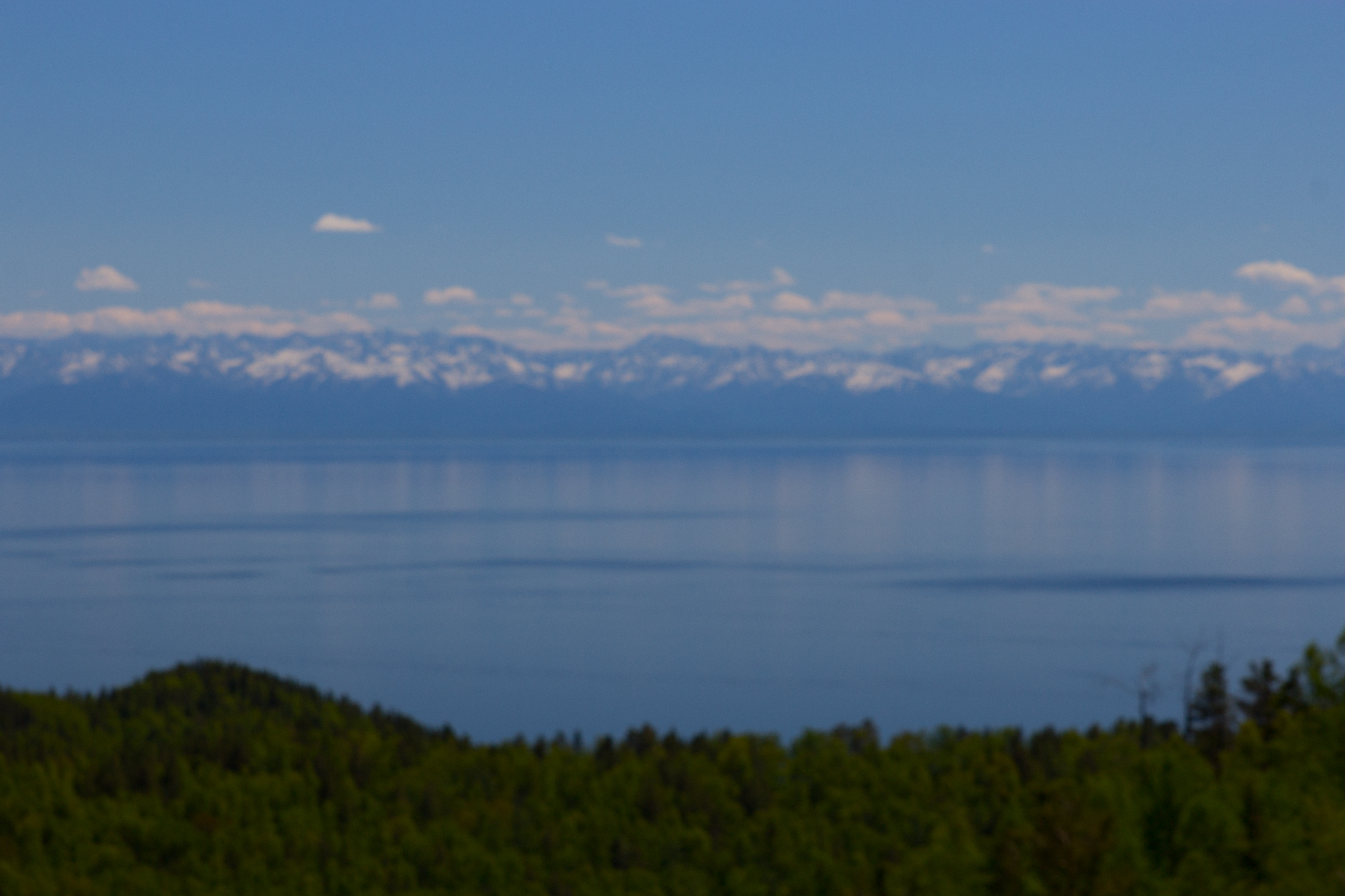 2014-06-12_09-42-46_IMG_6838-46-2-2